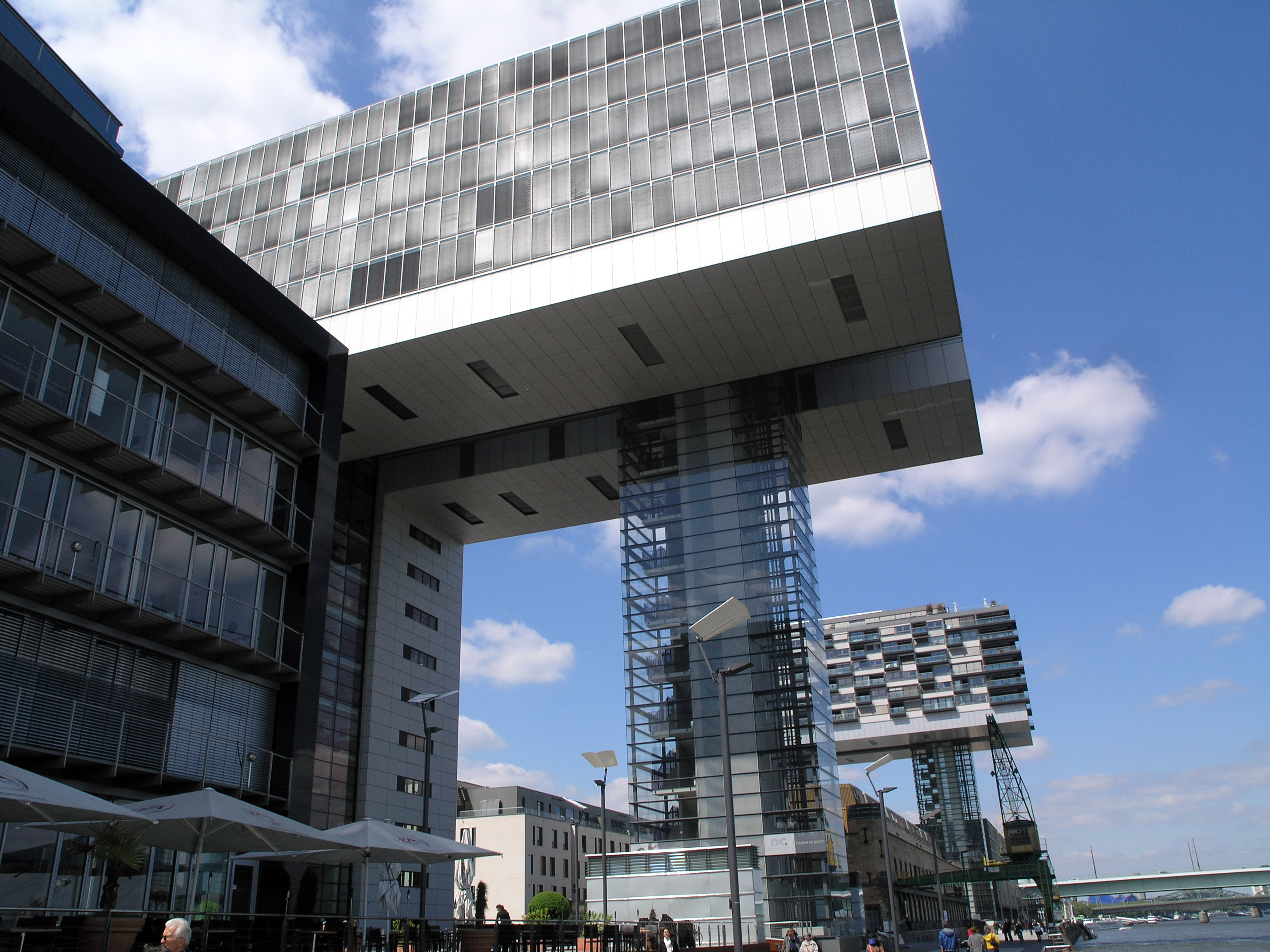 Северный Рейн-Вестфалия, Кёльн – набережная Rheinauhafen